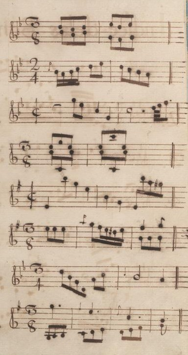 Table du volume III des manuscrits de Venise (incipit des sonates 22 à 30, K. 227 à 235.